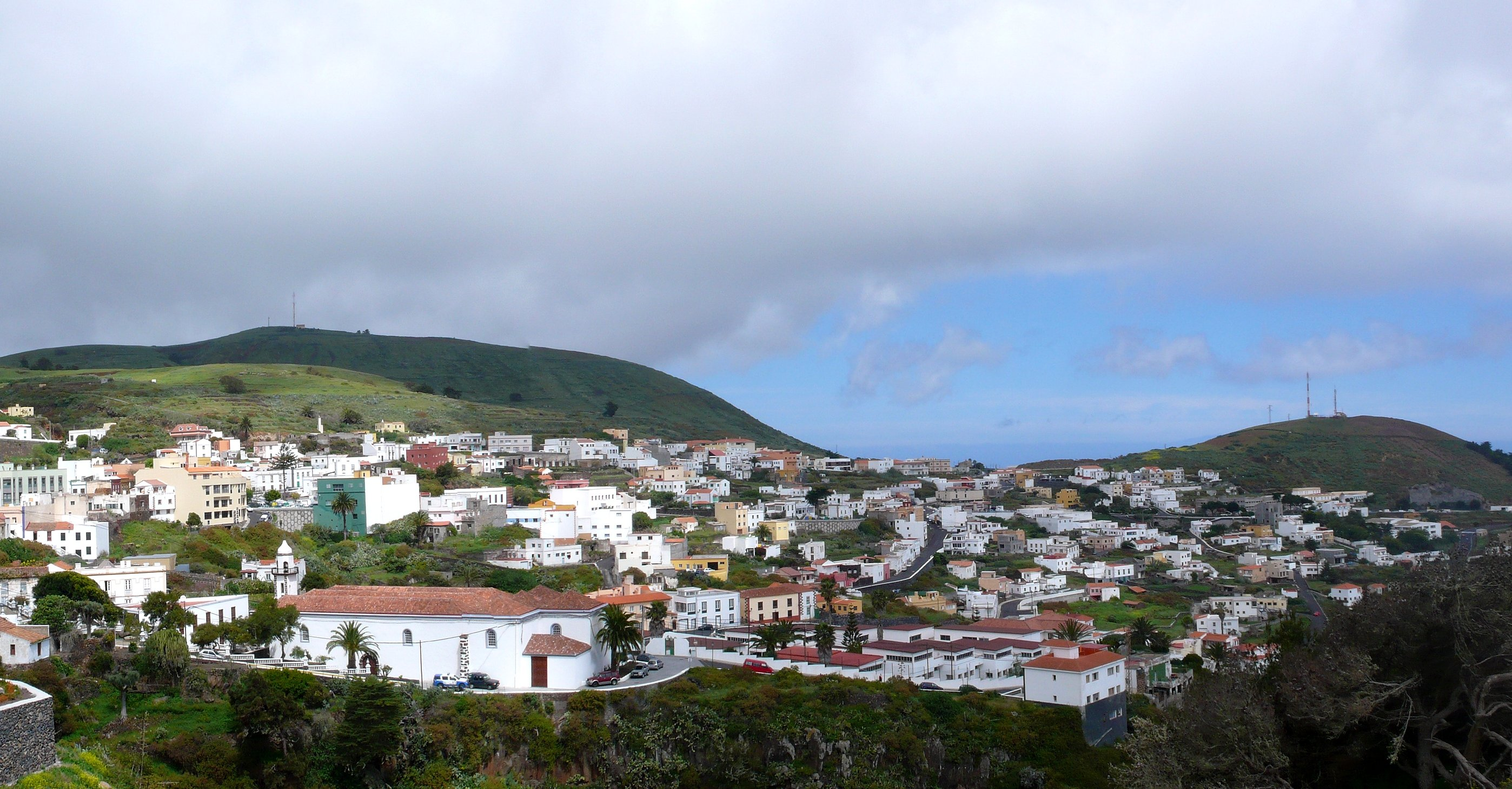 Vista del casco urbano de Valverde